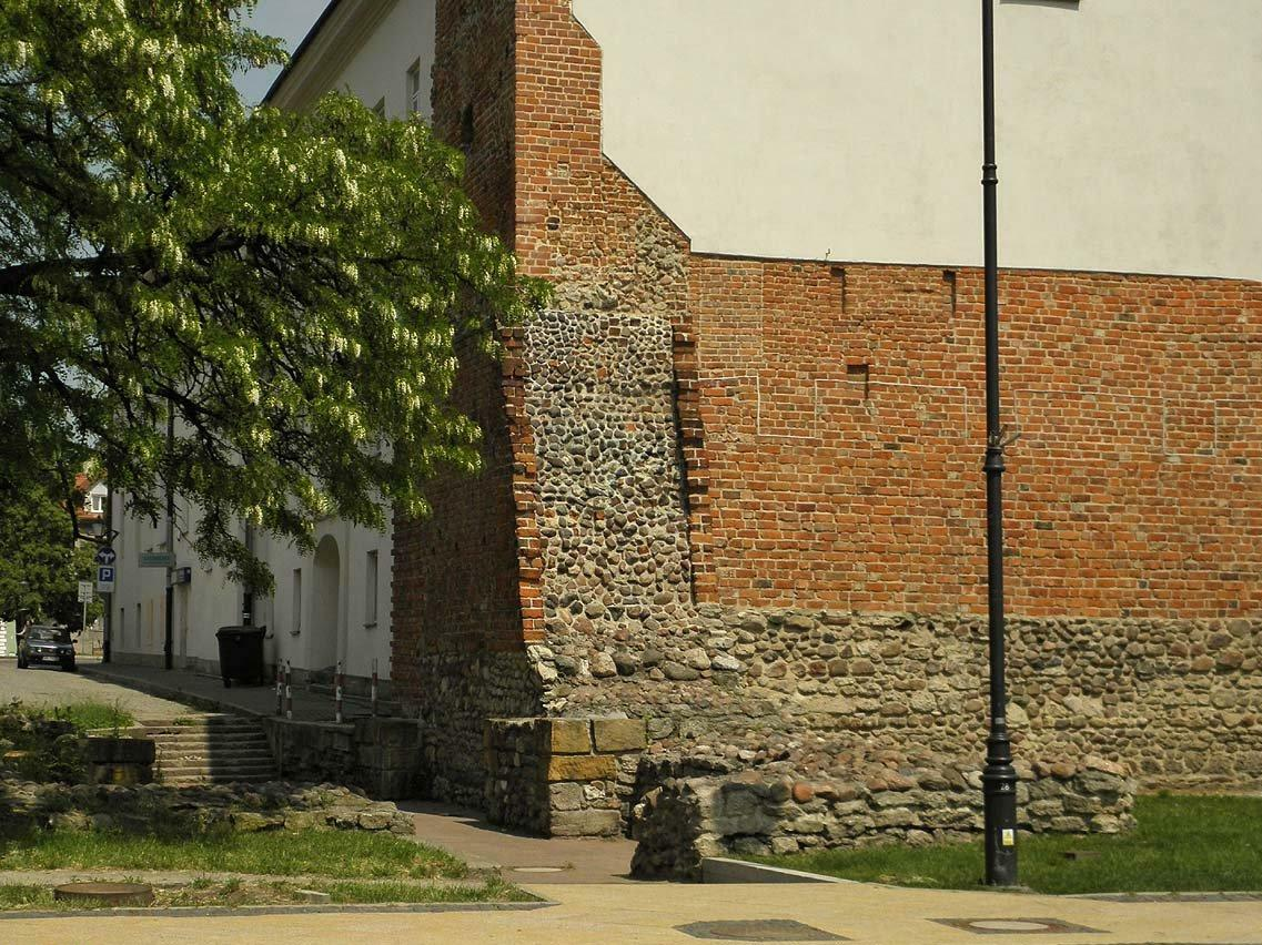 Pozostałość murów miejskich.